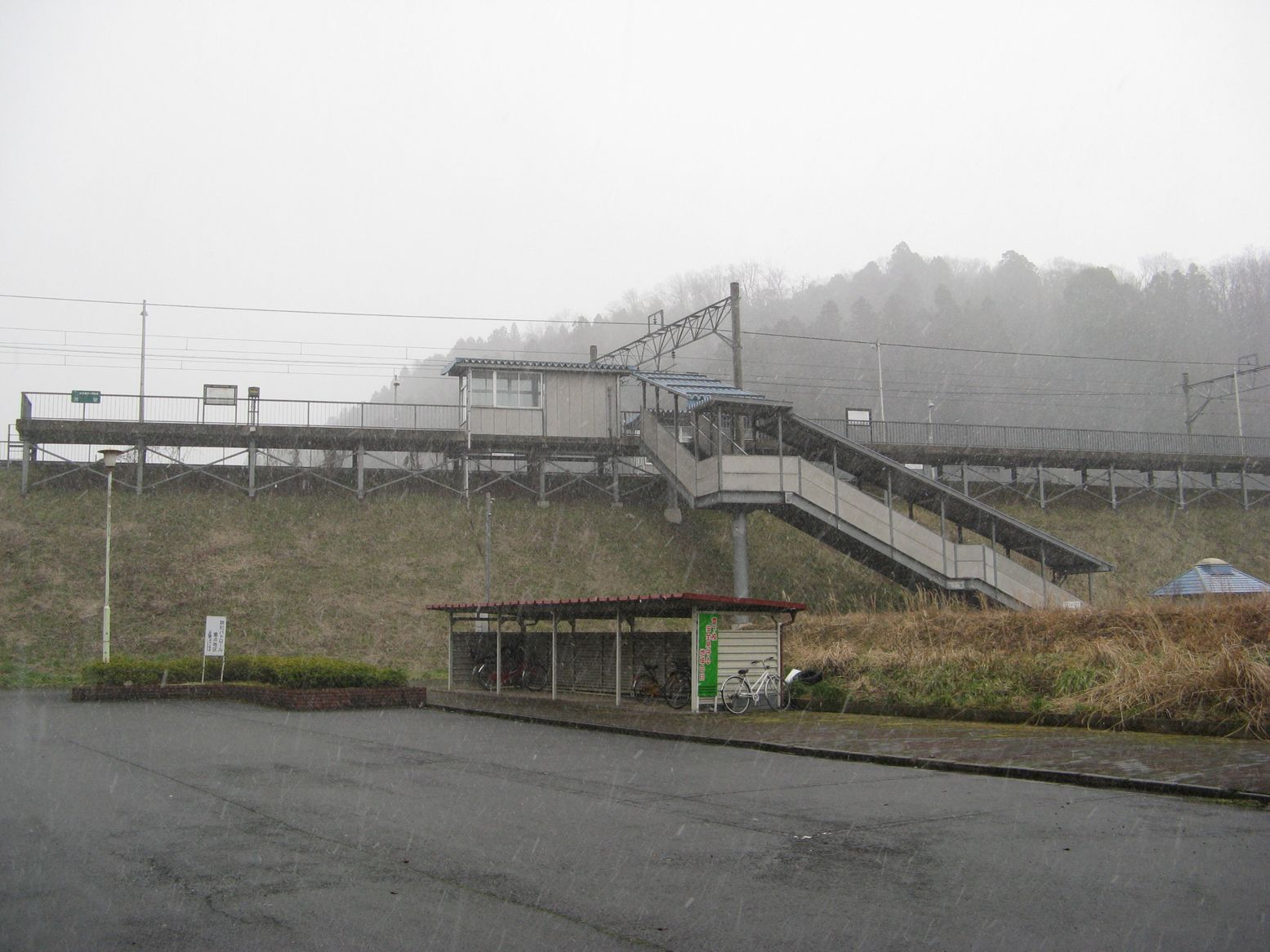 KTR宮福線 牧駅